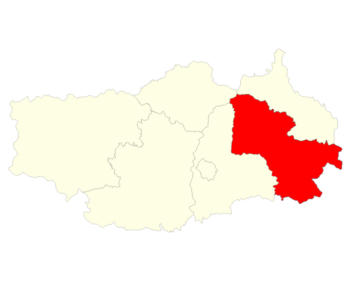 Localisation du district d'Antanifotsy dans la région Vakinankaratra